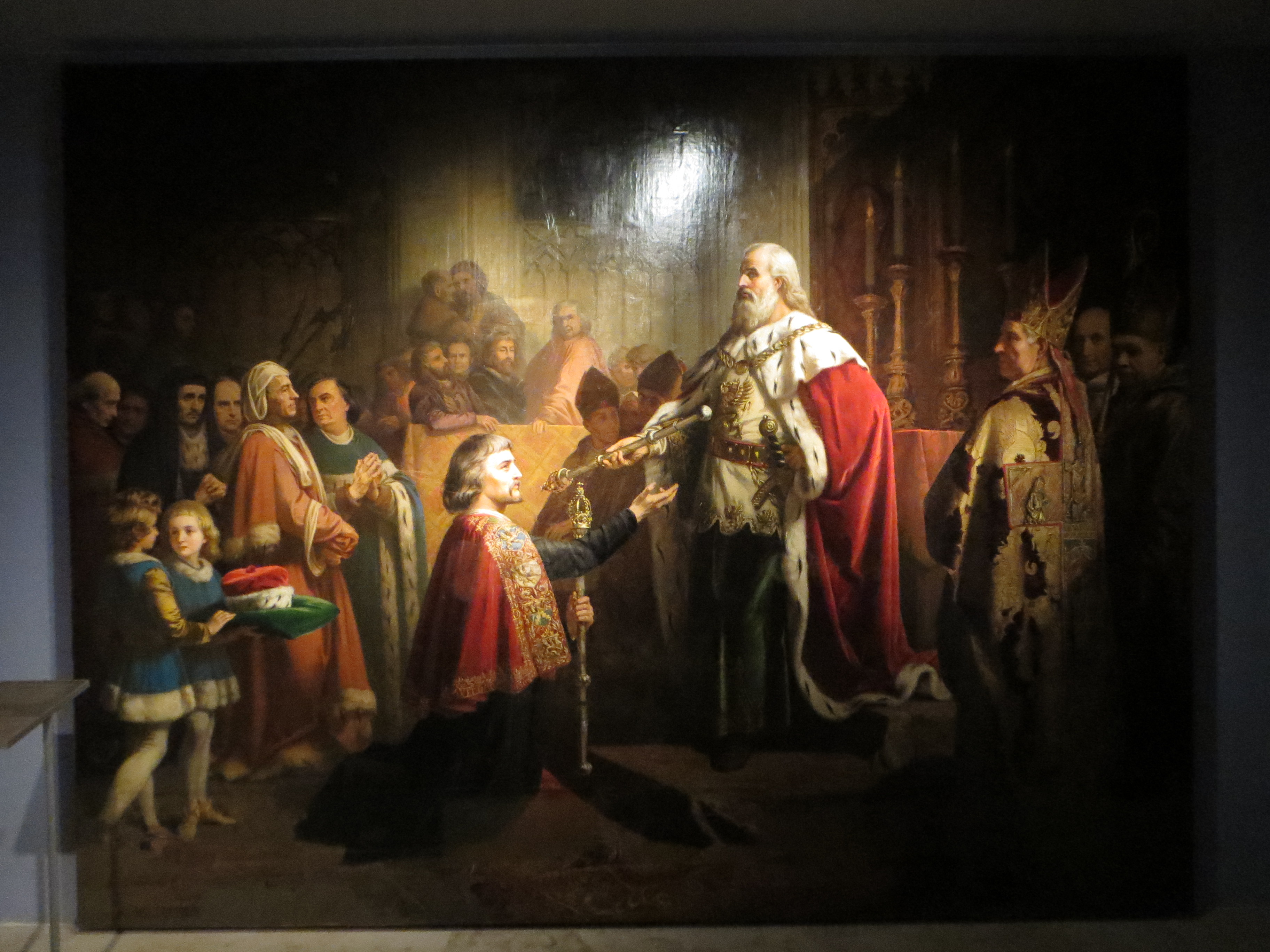 Otto Heyden: Herzog Wartislaw IX. übergibt Dr. Heinrich Rubenow die Szepter, 1856, Öl auf Leinwand, 303 x 376 cm, Kunstsammlung der Ernst-Moritz-arndt-Universität Greifswald, ausgestellt im Pommerschen Landesmuseum Greifswald